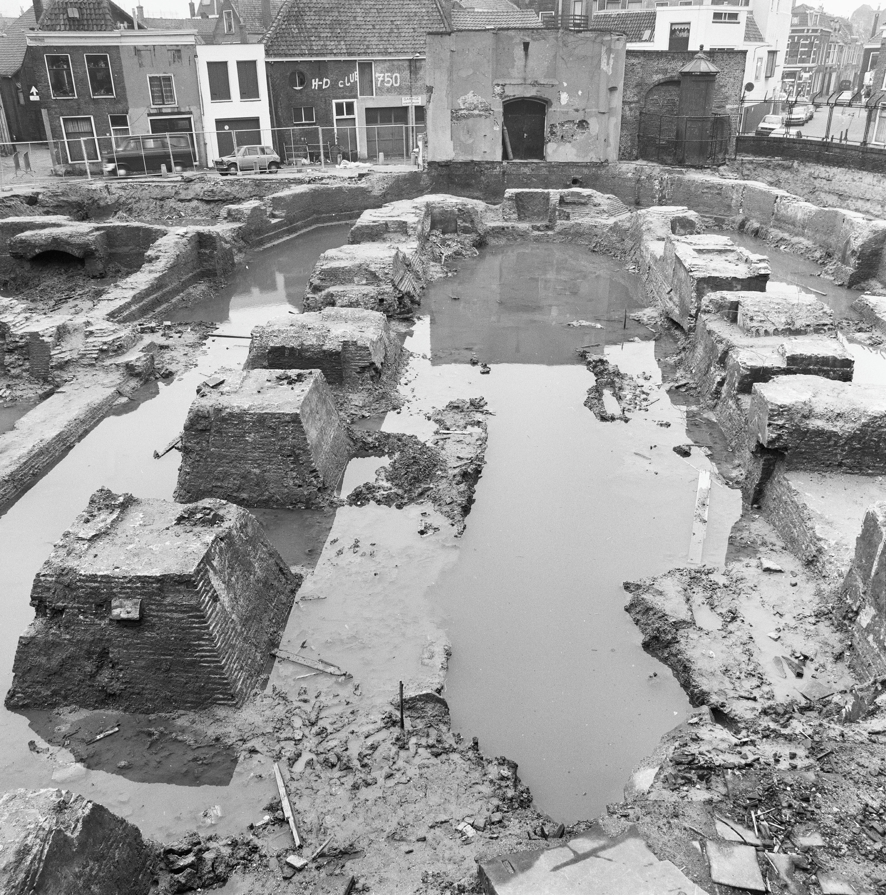 v.m. O.L.Vr. Kerk: opgegraven fundering gezien naar het oosten